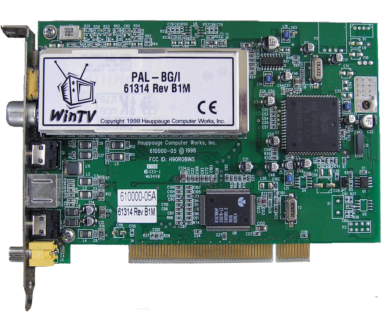 Hauppauge WinTV GO